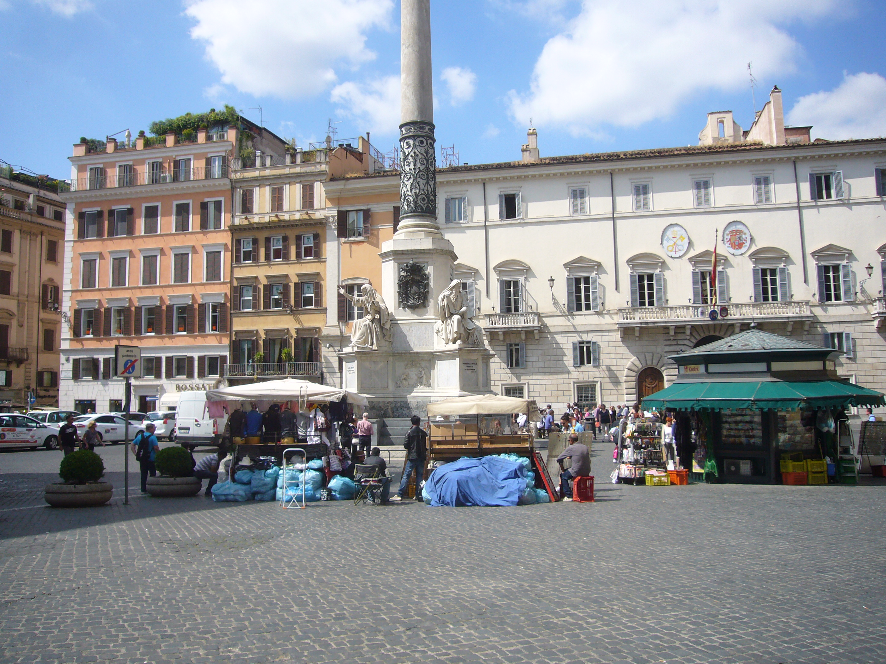 Roma, piazza di Spagna. Bancarelle di ambulanti. Dietro, il magazzino. Il tutto, in mezzo alla piazza.